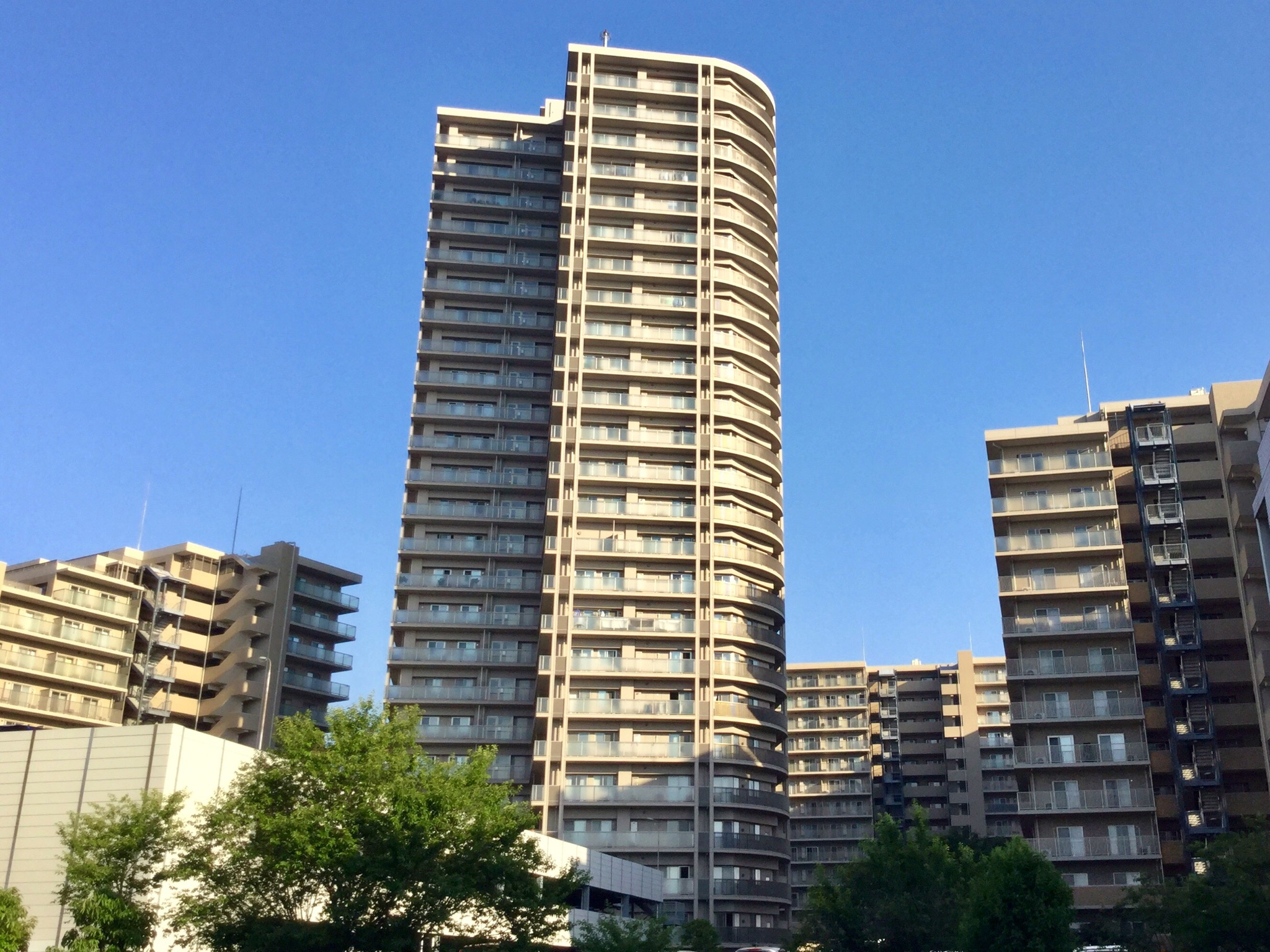 湘南台駅周辺の高層マンション群